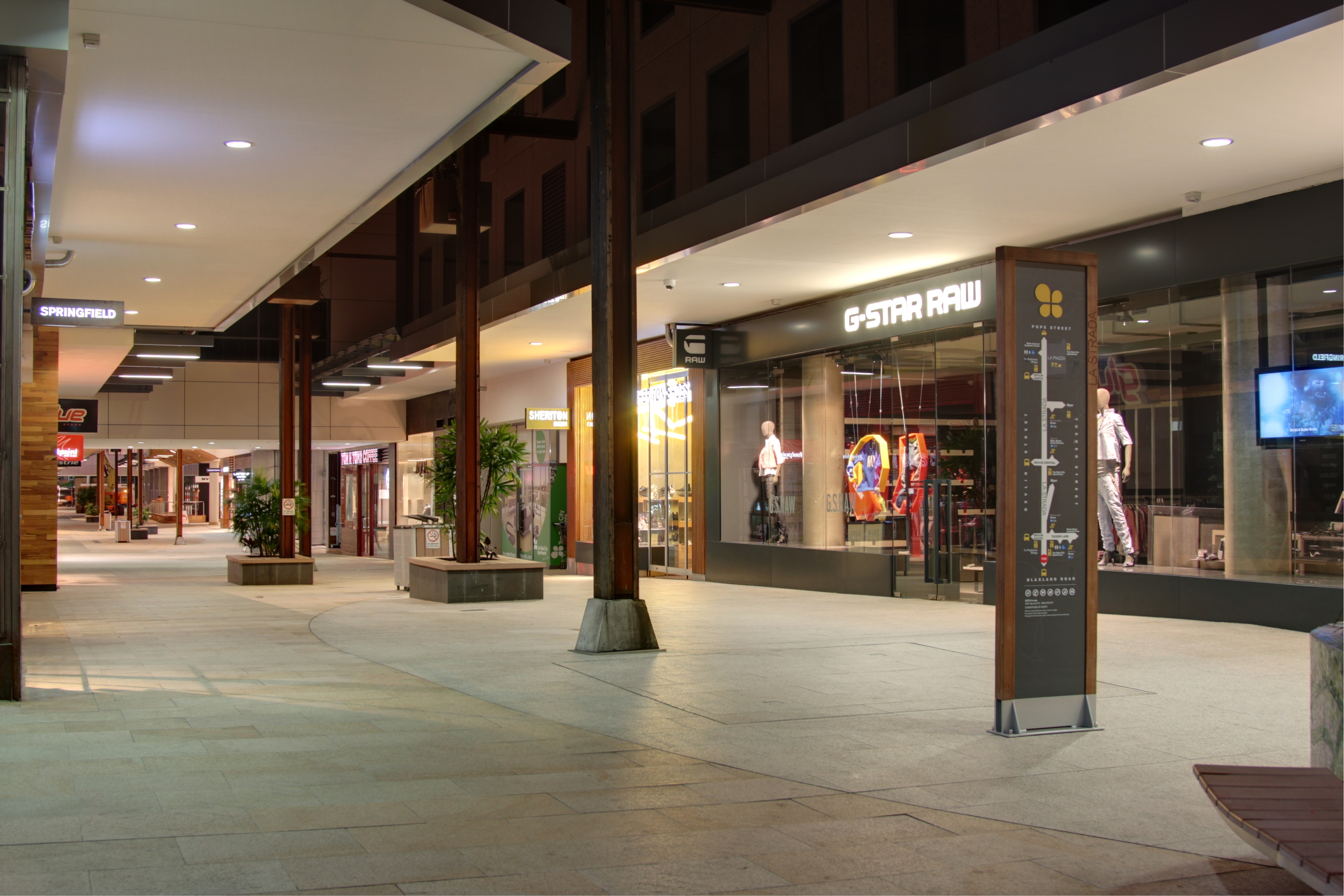 Ryde Civic Center